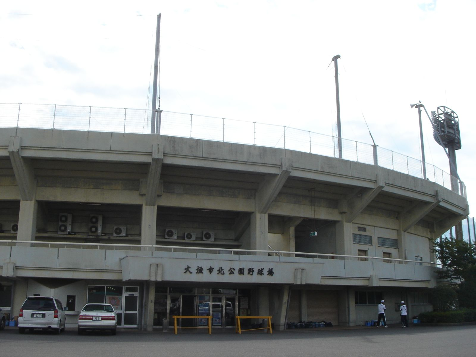 (大垣市北公園野球場),Ogaki,Gifu,Japan(岐阜県大垣市)で撮影